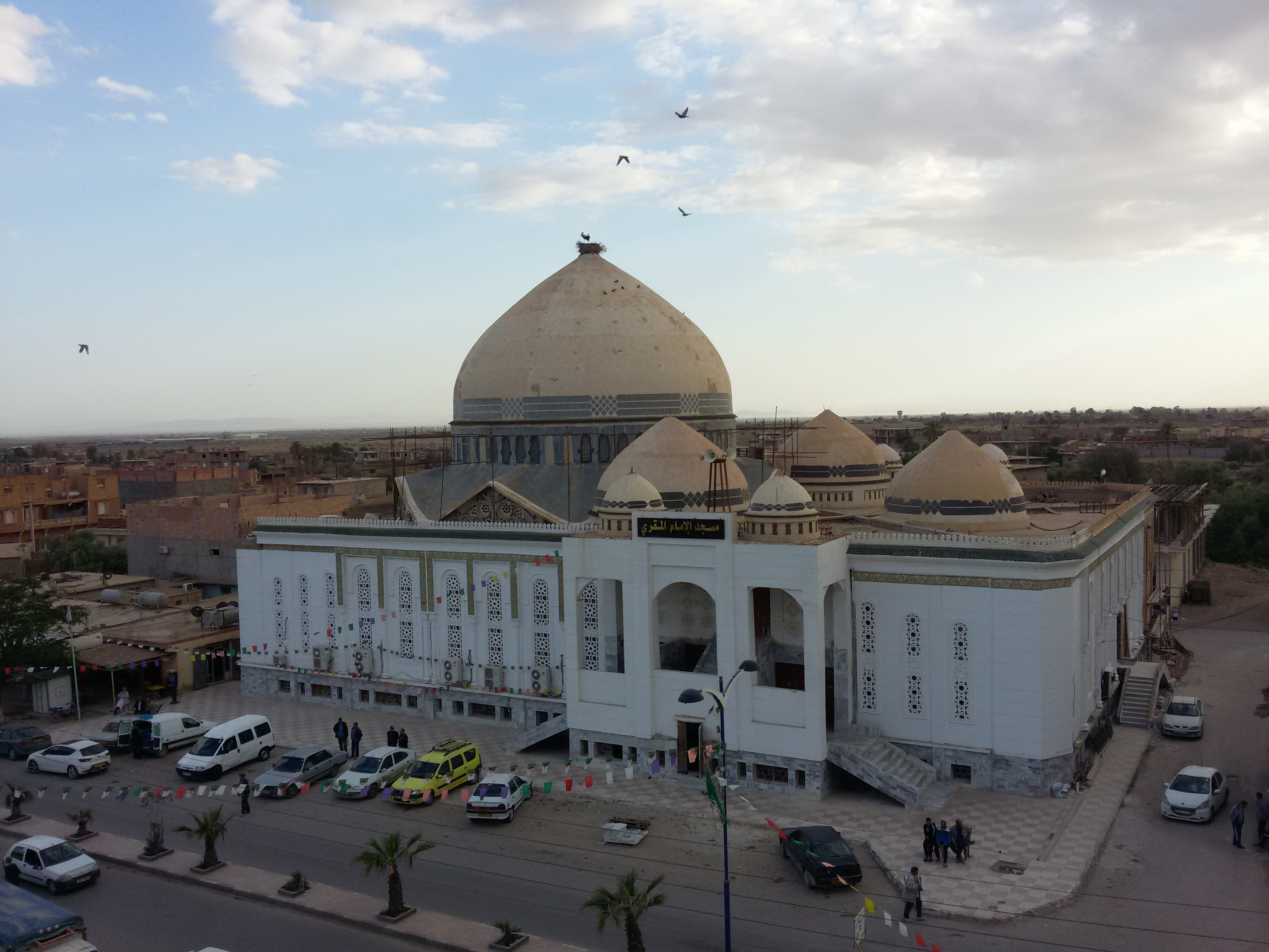 مسجد المقري في قلب المدينة، نسبة إلى العلامة أحمد بن محمد المقري رحمه الله.